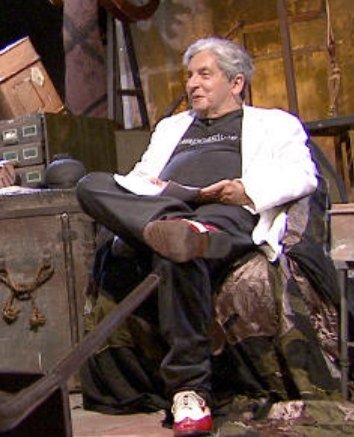 Domingos José Soares de Oliveira (Rio de Janeiro, 28 de setembro de 1936) é um ator, dramaturgo e cineasta brasileiro. Foto tomada durante sua apresentação no programa Arte do Artista, da TV Brasil